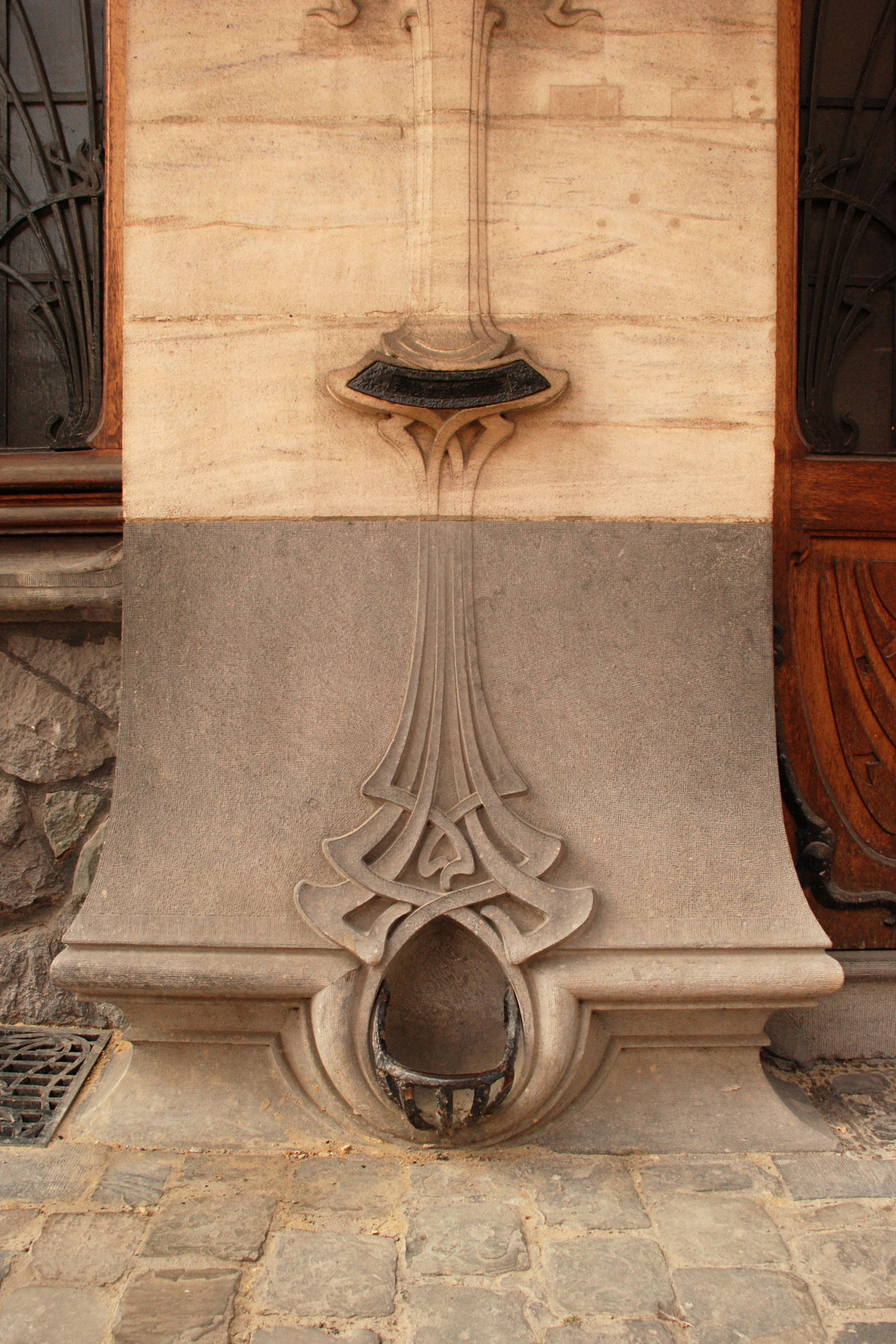 Belgique - Bruxelles - Maison Beukman (Art nouveau, architecte Albert Roosenboom, 1900)